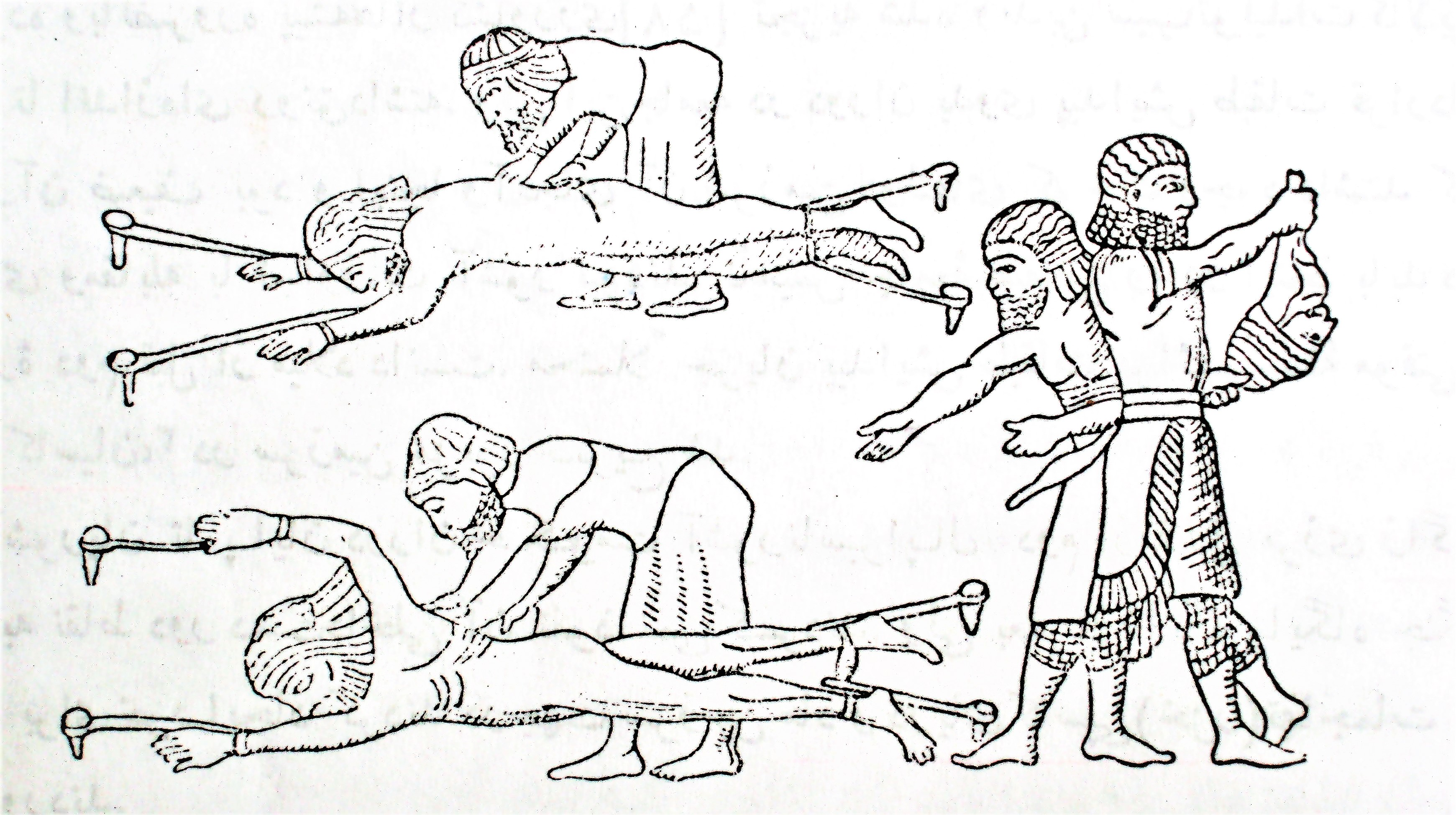 سیاست پیشوایان اسیر، که در برابر آشوریان مقاومت ورزیده بودند. نقش برجسته نینوا